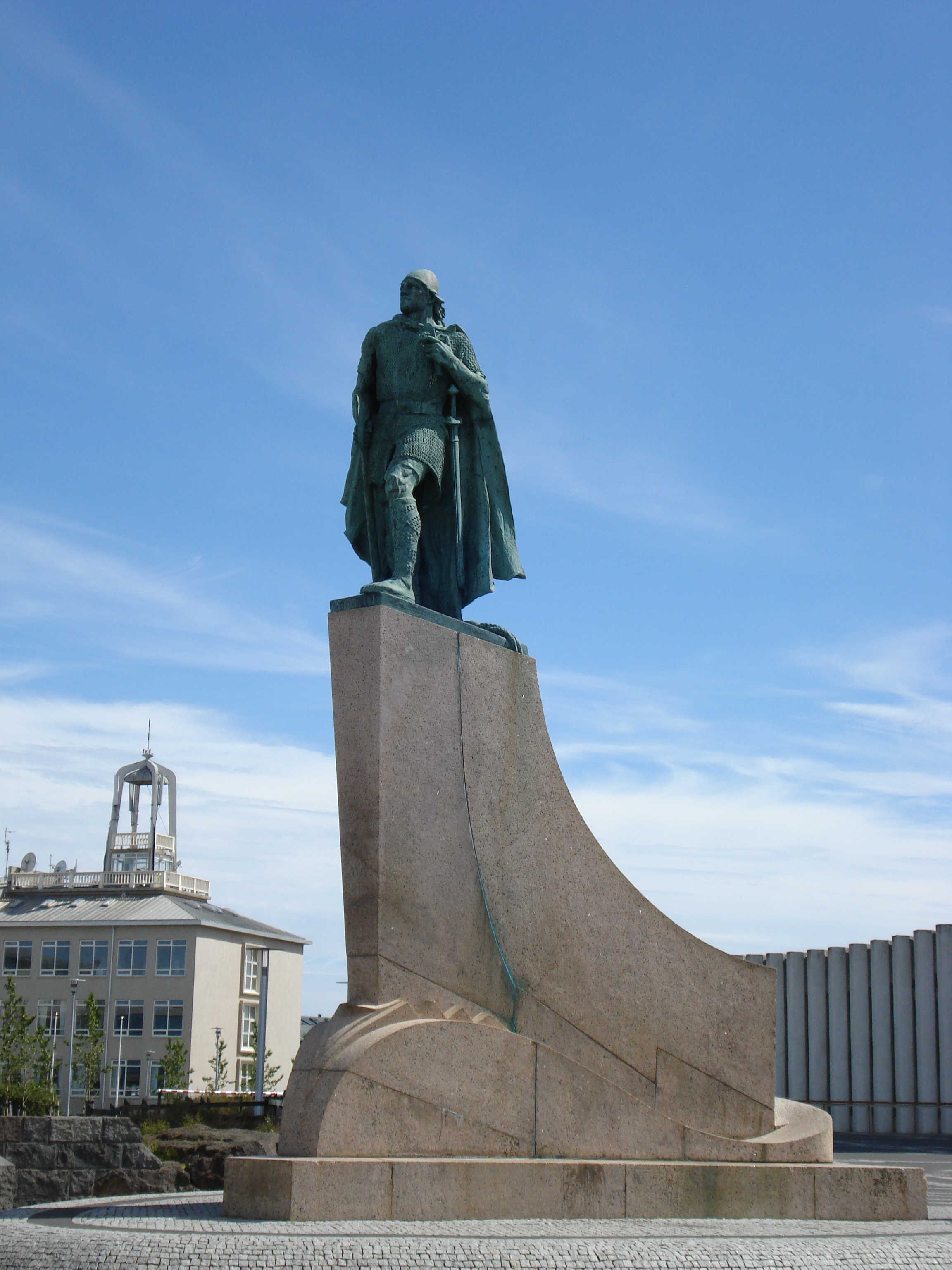 Leifur Eiríksson, Reykjavík, Iceland Leifr Eiricsson Son of Iceland Discoverer of Vinland The United State of America To the people of Iceland on the one thousandth anniversary of the Althing AD 1930